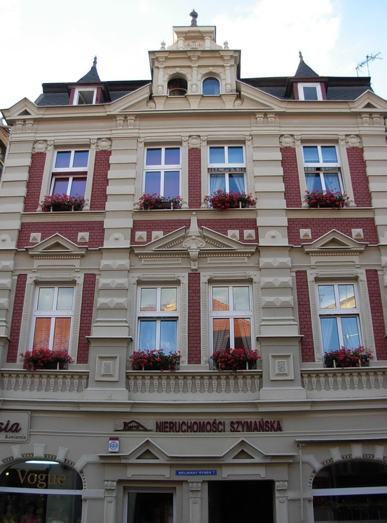 Kamienica Wełniany Rynek 7 w Bydgoszczy